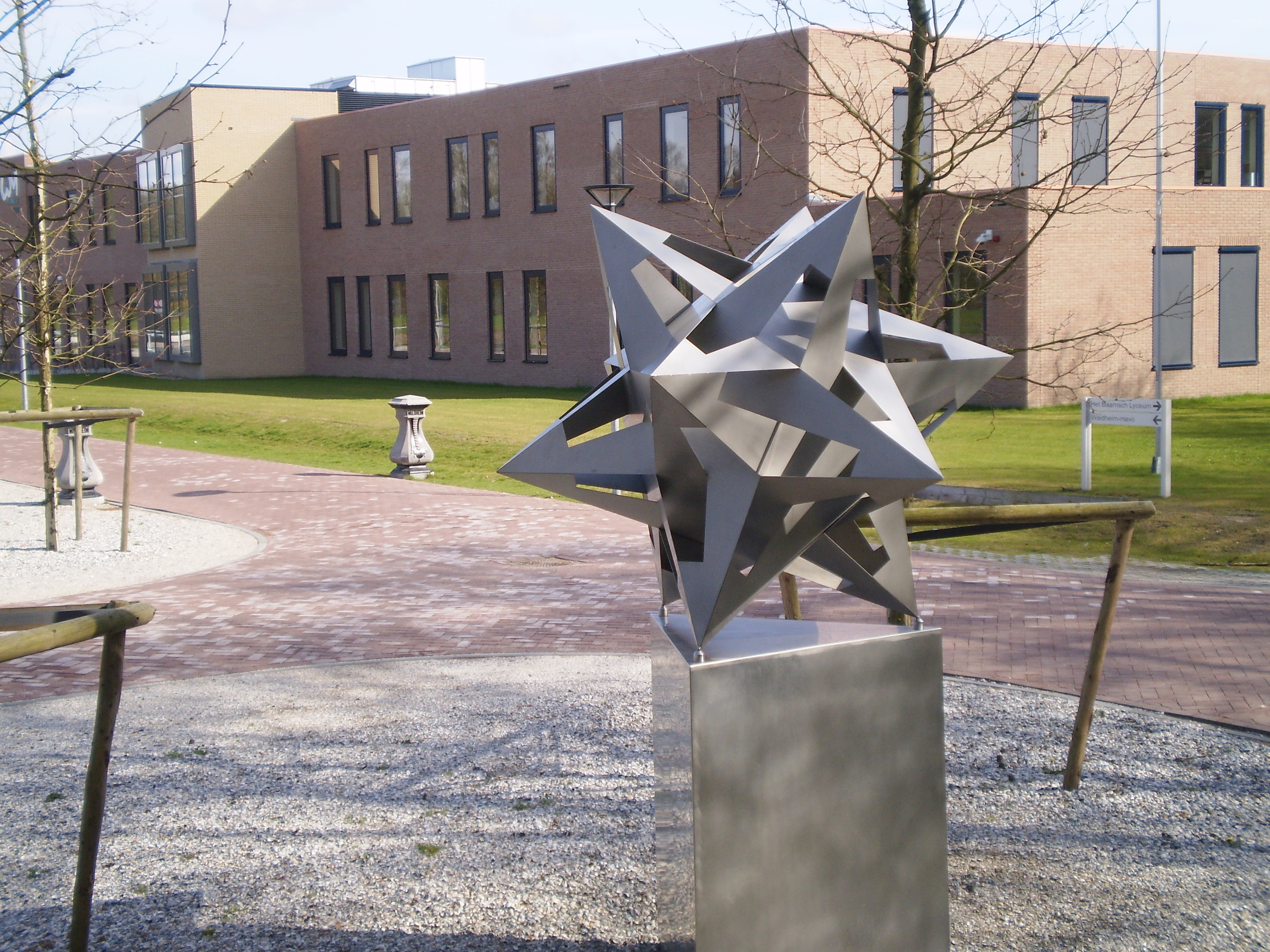 Het Baarnsch Lyceum